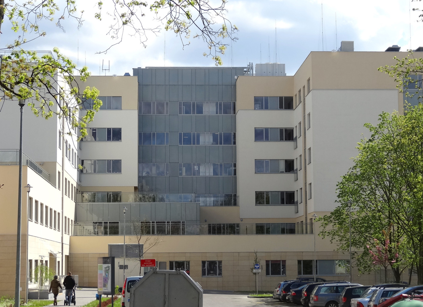 Wojewódzki Szpital Dziecięcy im. Józefa Brudzińskiego w Bydgoszczy przy ul. Jana Karola Chodkiewicza 44